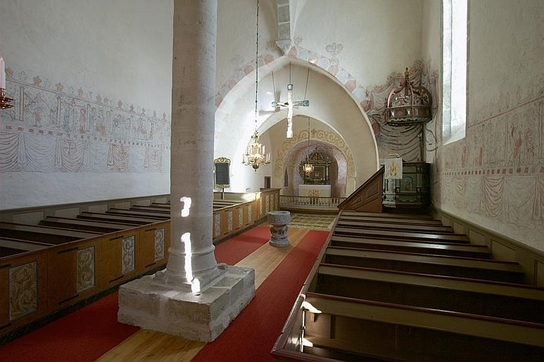 Altargången. Motiv: Gerums kyrka Kategori: (02) InteriörerAltargången.